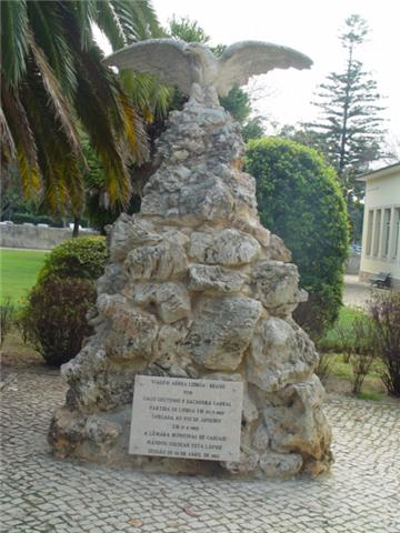 Àguia